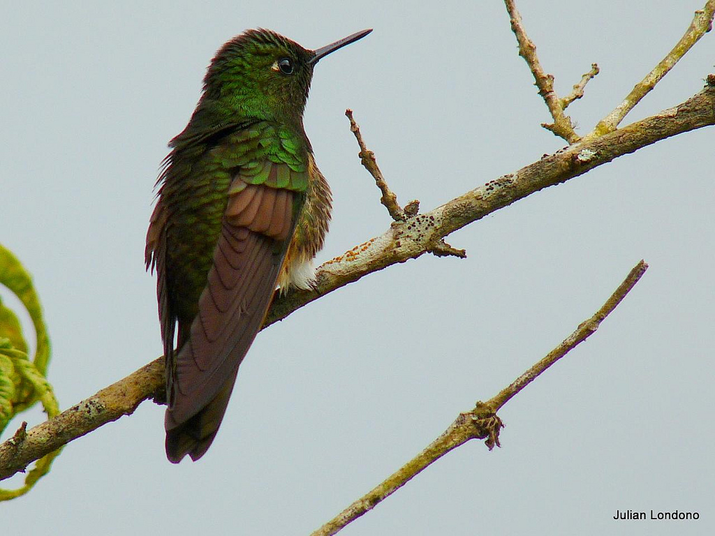 Fotografía espontánea y al natural. Foto sin recortes ni post-procesos. Escuche el canto y vea el mapa de distribución de ésta especie en: Disfrute más fotos de las aves de Aralcal en éste vínculo